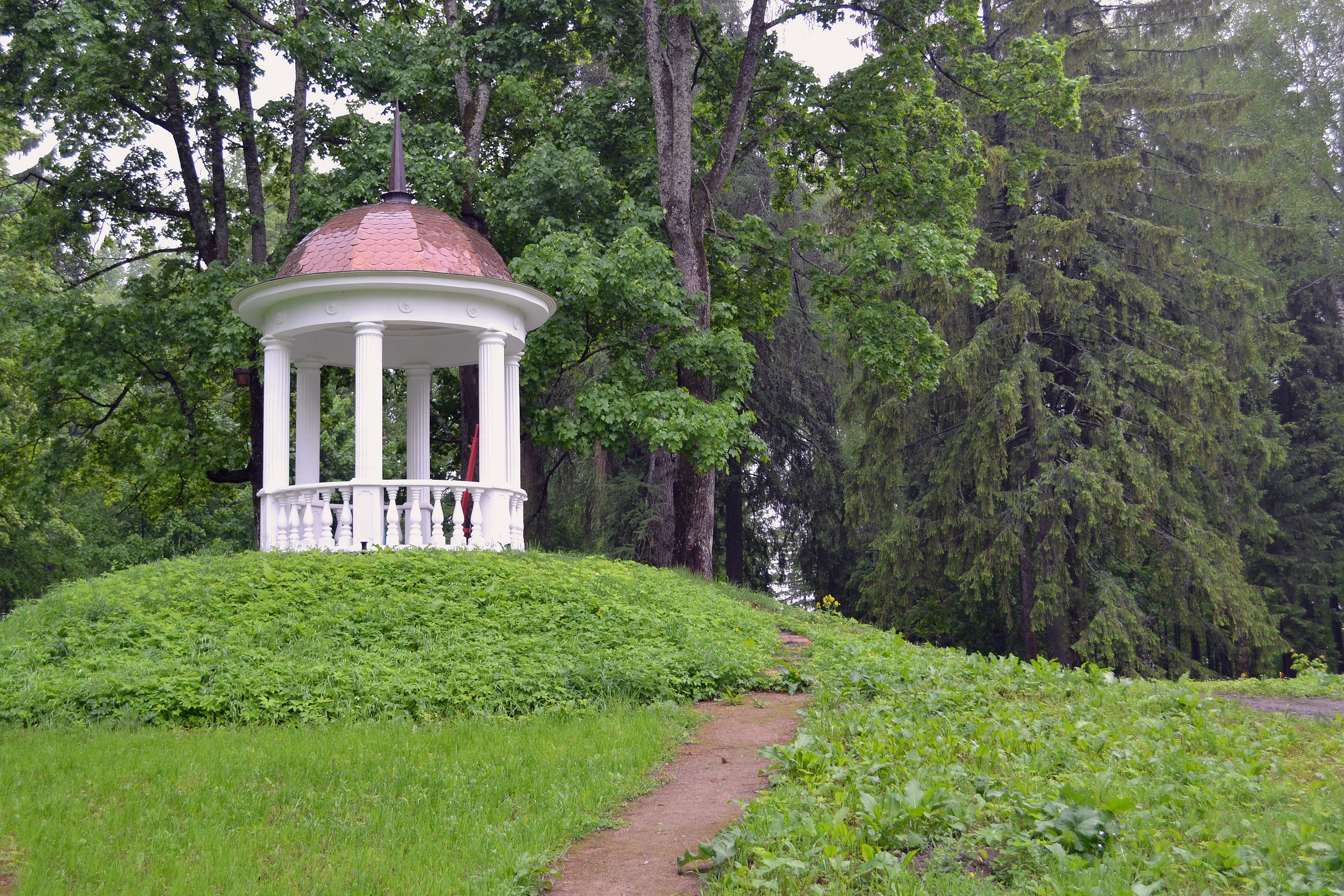 Парк: Воронино, Ростовский район, Ярославская область